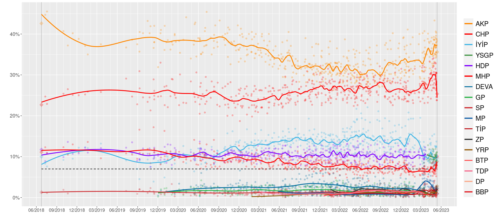 2023 Türkiye genel seçimleri için yapılan anketlere dair grafik. GP ve DEVA dışında renkler parti logolarından alındı. Orijinal dosyaya adresinden ulaşılabilir.